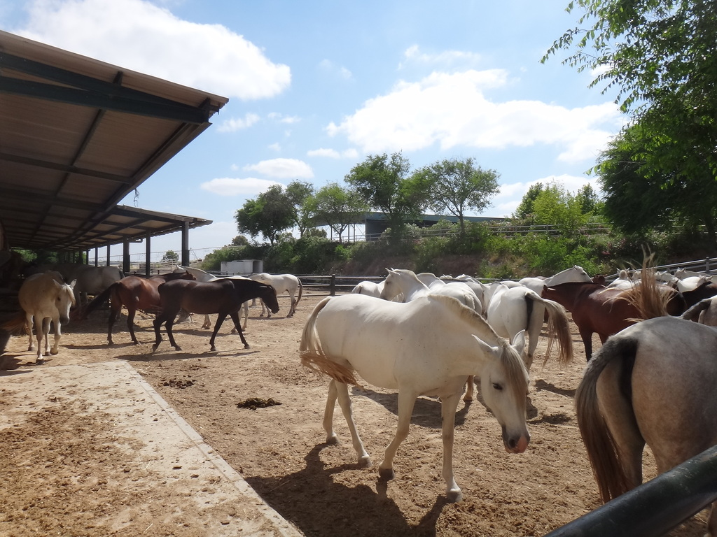 Yeguada del Hierro del Bocado, Jerez de la Frontera (Andalucía, España). Yeguas